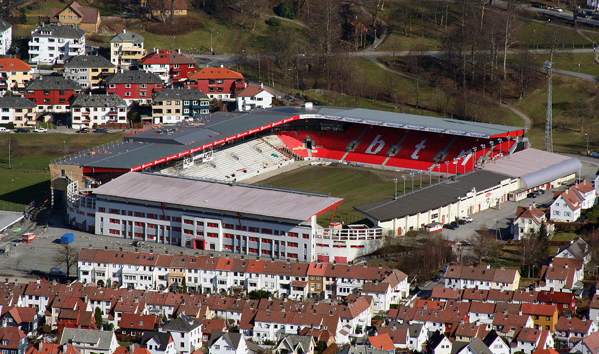 S.K. Brann's stadium Brann stadion